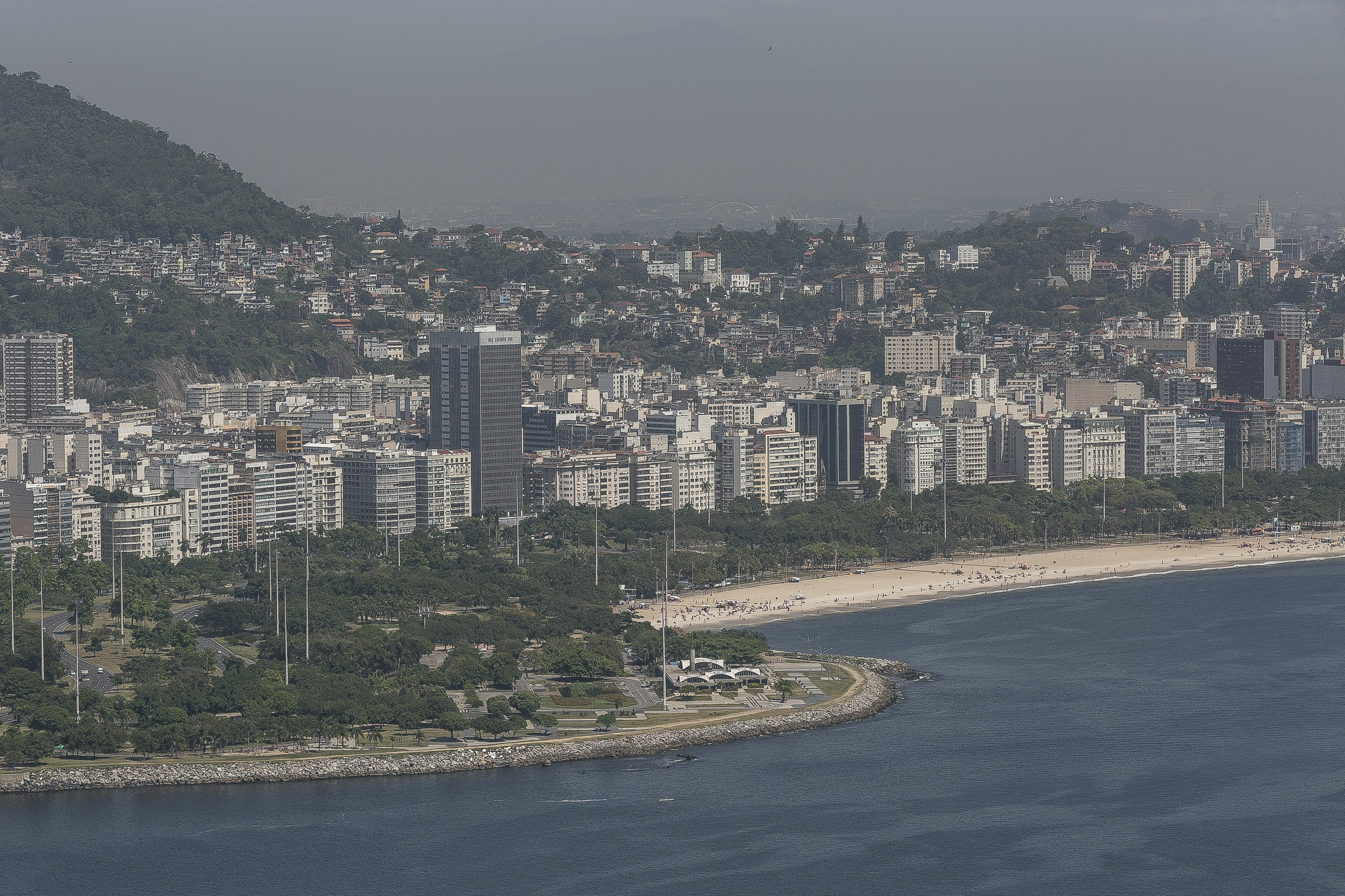 Vista aérea do aterro do Flamengo, localizado na cidade do Rio de Janeiro.